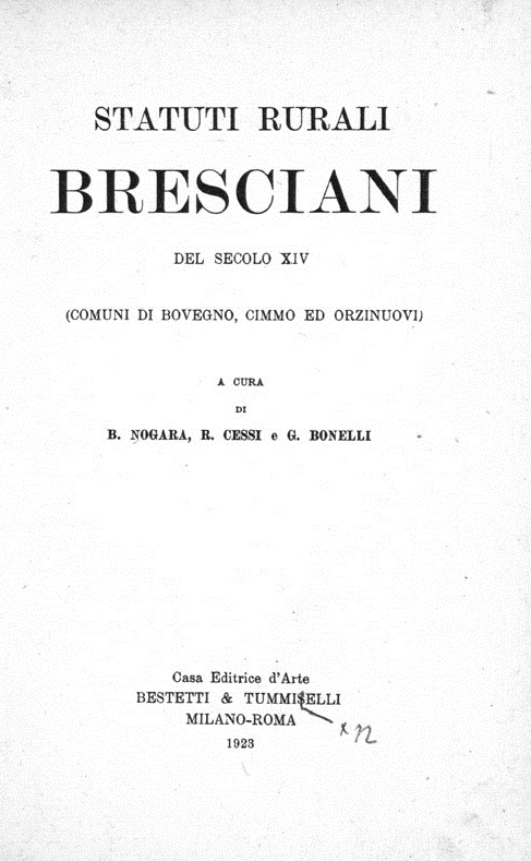 Frontespizio